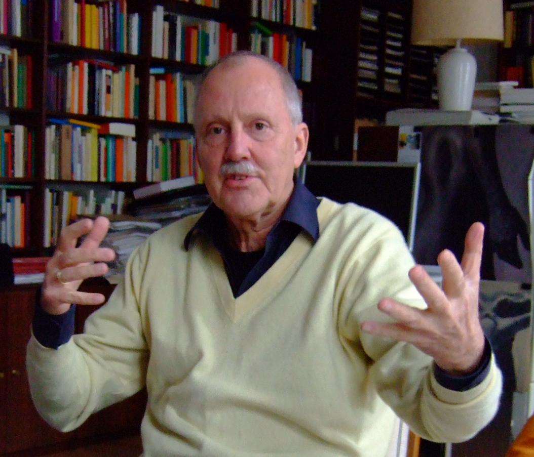 Rüdiger Lautmann in seinem Hamburger Arbeitszimmer.